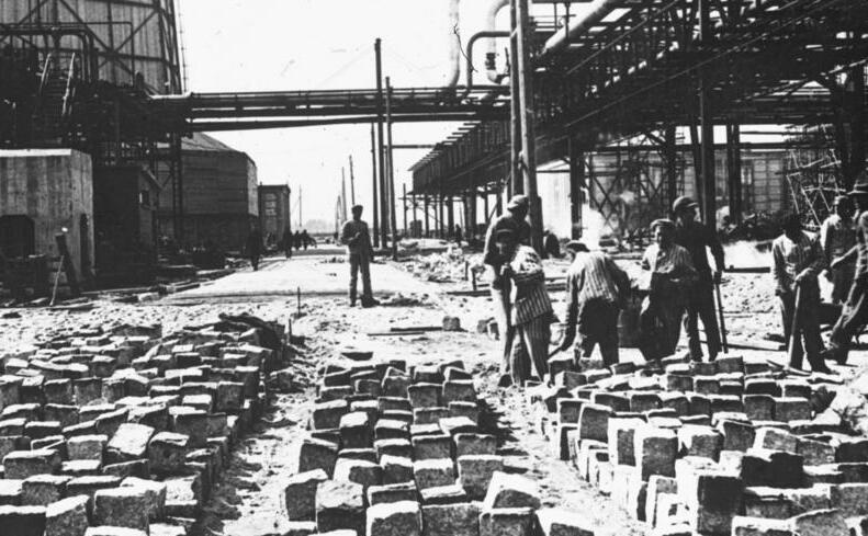 19 Strassenbauarbeiten